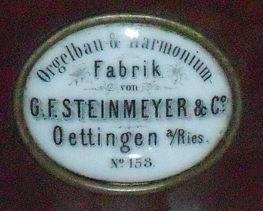 Porzellanschild der Fa. Steinmeyer am Spieltisch der Orgel der ev. Kirche in Leutershausen/Mittelfranken